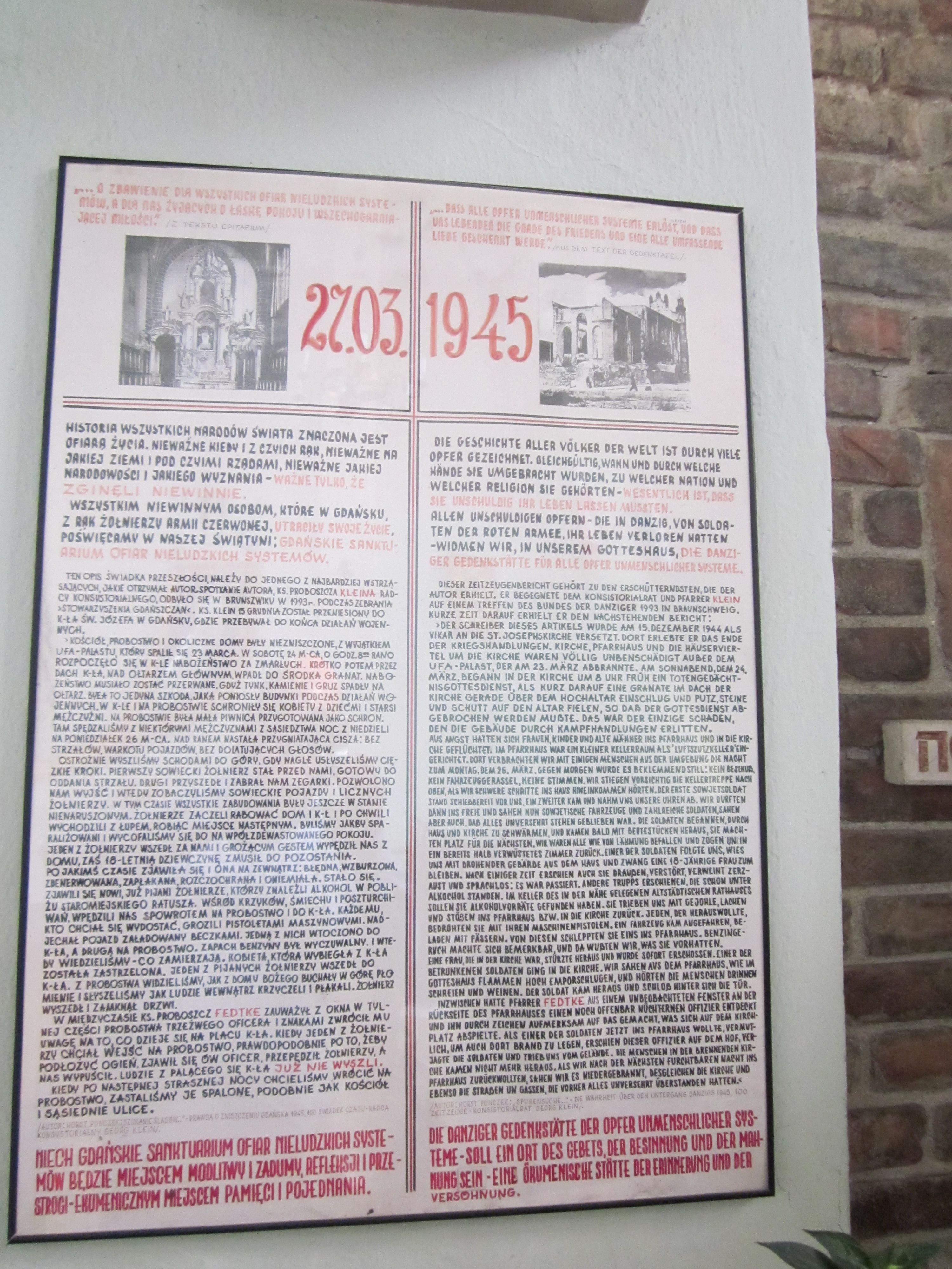 Augenzeugenberichts des damaligen Vikars Georg Klein über das Massaker von Soldaten der Roten Armee an mehr als 100 Menschen in der Josephskirche in Danzig. Der Bericht befindet sich in der Danziger Gedenkstätte der Opfer unmenschlicher Systeme in der Josephskirche.